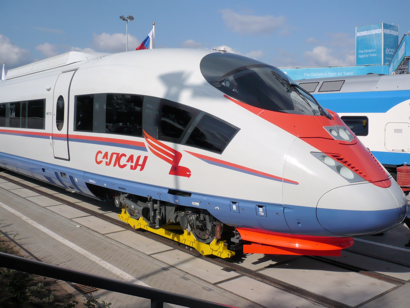 Velaro RUS auf der Innotrans 2008. The train is sitting on yellow "wheel skates" to convert the 1,520 mm Russian gauge of the train bogies to 1,435 mm standard gauge of the tracks at the Messe Berlin fair-grounds.